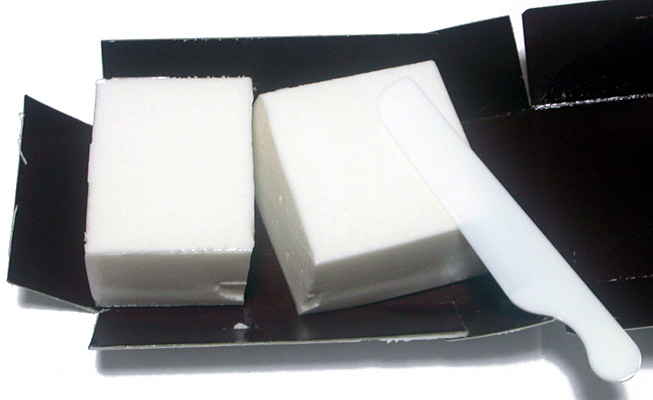 撮影者：小太刀 淡雪。愛知県岡崎市備前屋の淡雪（純白）です。